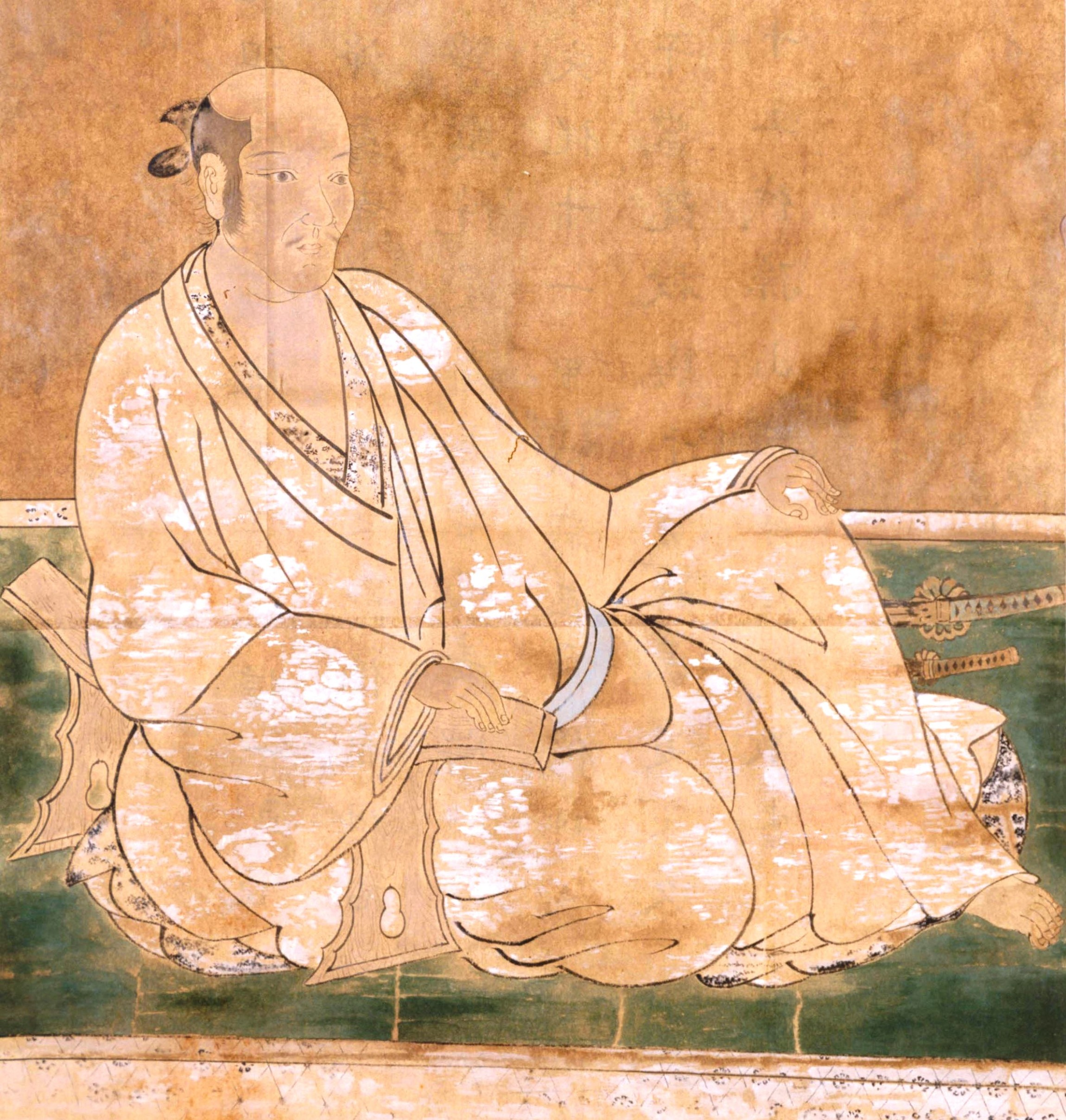 松平信一の肖像。